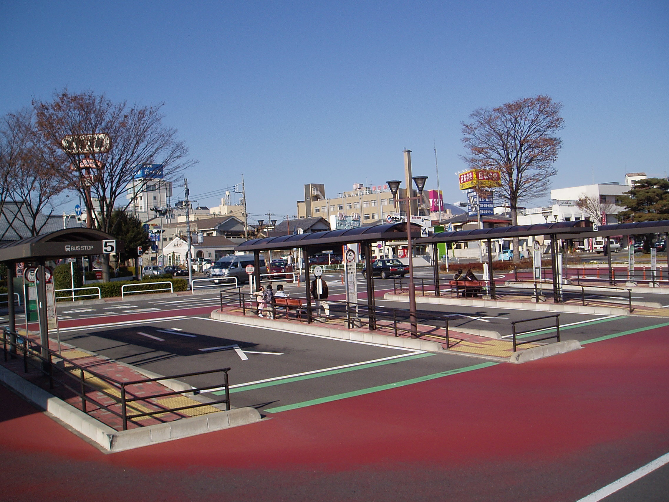 渋川駅前バスターミナル